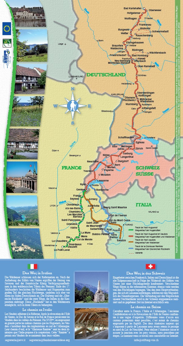 Internationaler Streckenverlauf